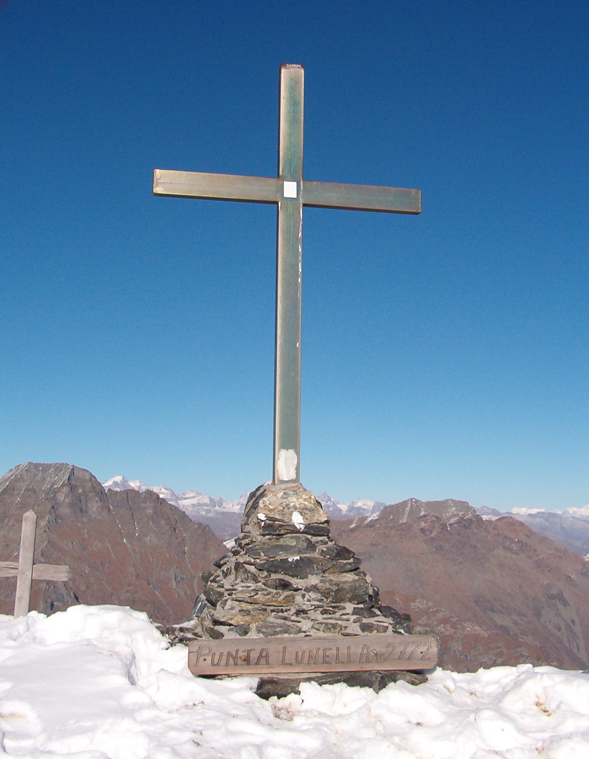 vetta Punta Lunella - Alpi Graie - Piemonte - Italy